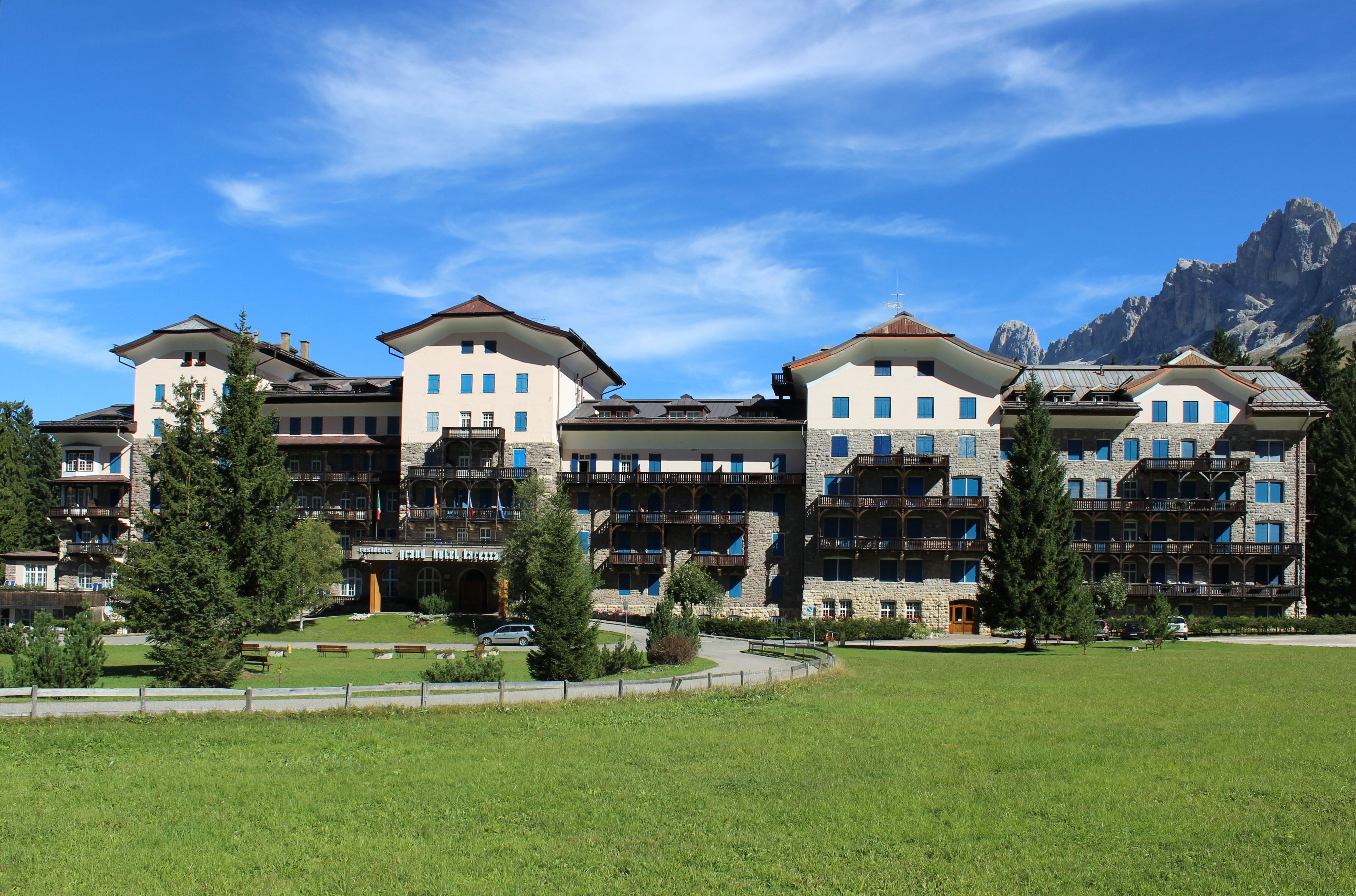 Grand Hotel Karersee in Welschnofen